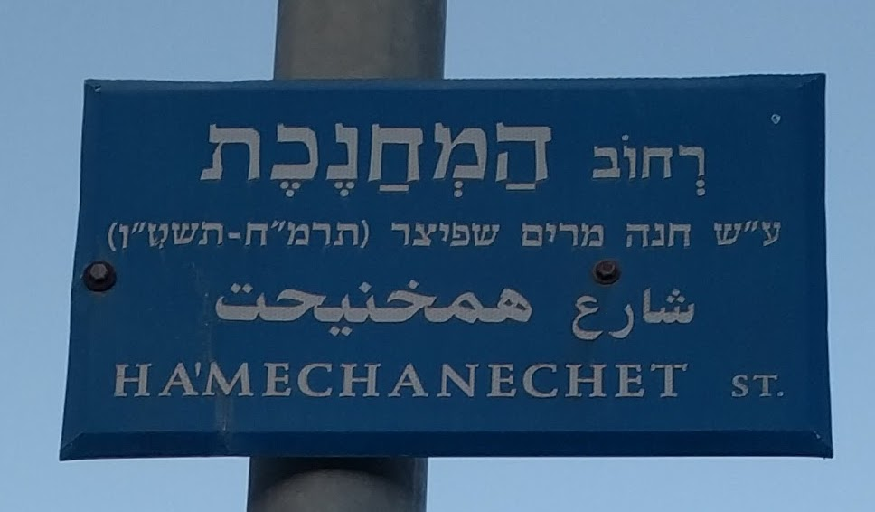 רחוב המחנכת ע"ש חנה שפיצר